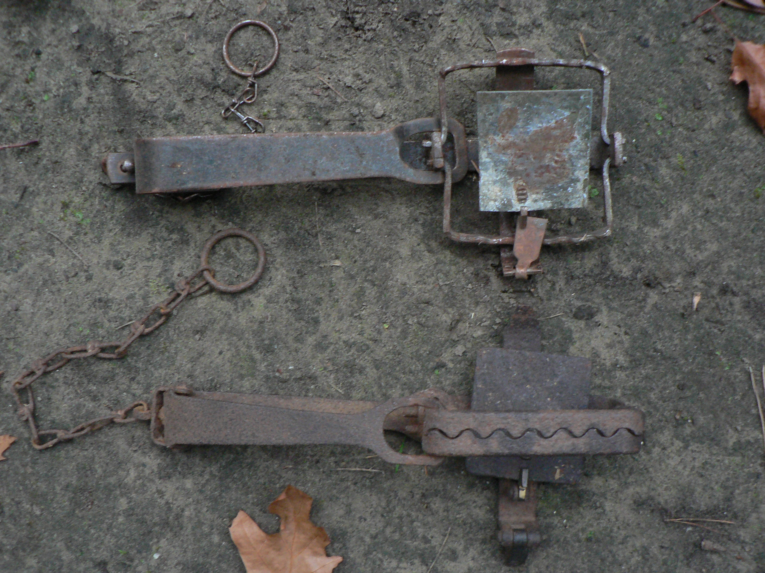 illegal fox clamps